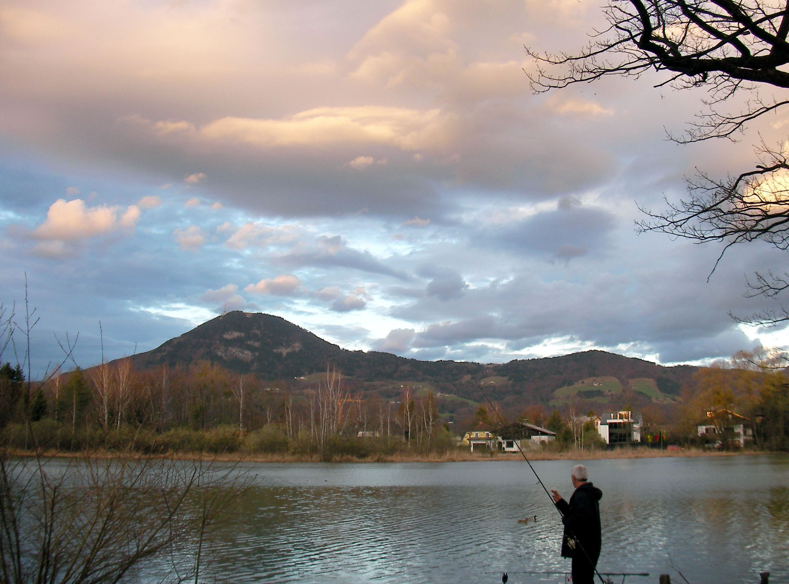 Gaisberg vom Ufer des Leopodskroner Weihers